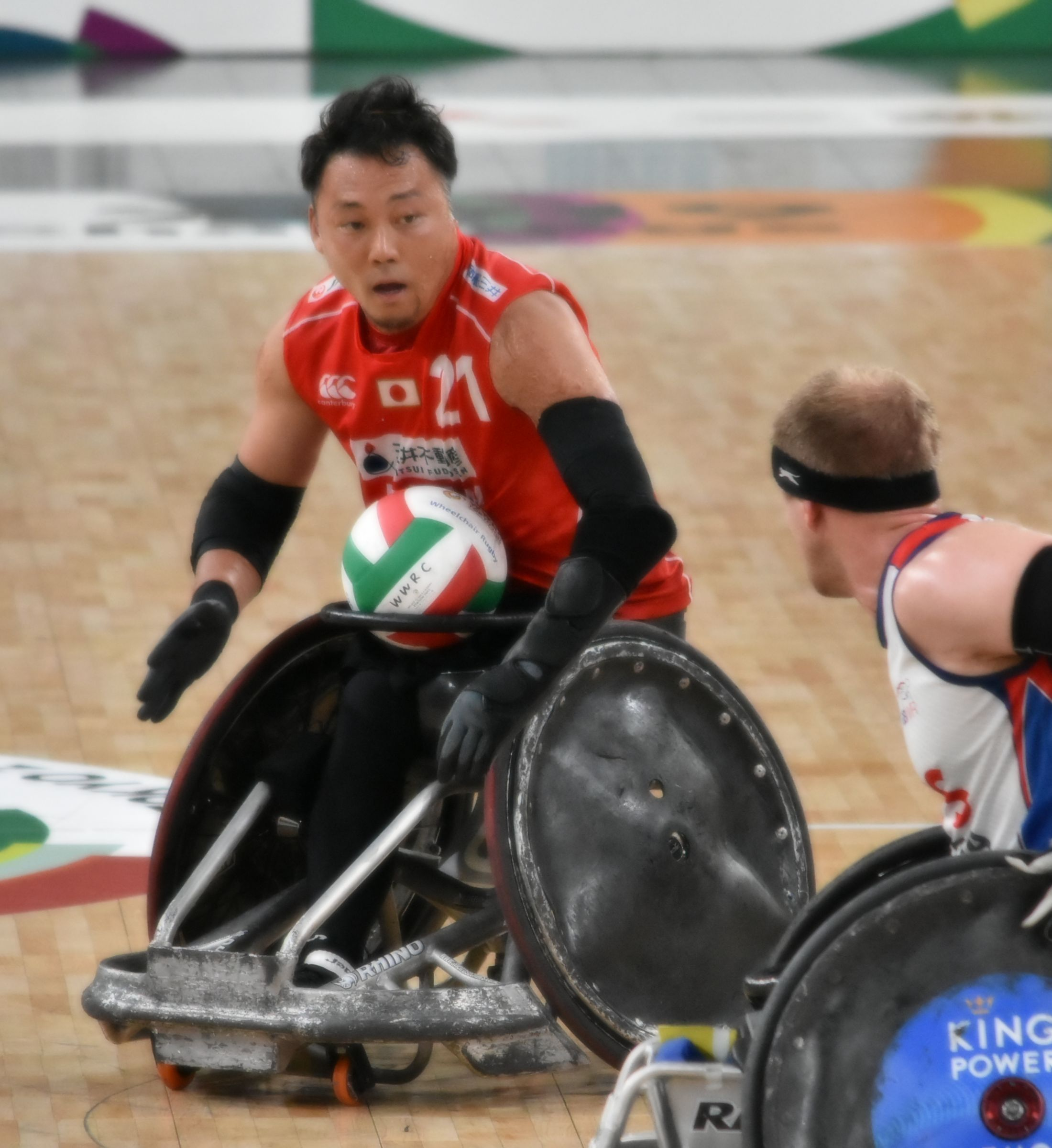 車いすラグビーワールドチャレンジ2019 池 透暢